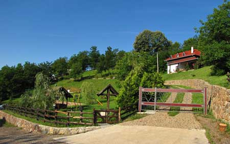 Ranč Platan, autor M.Žigić